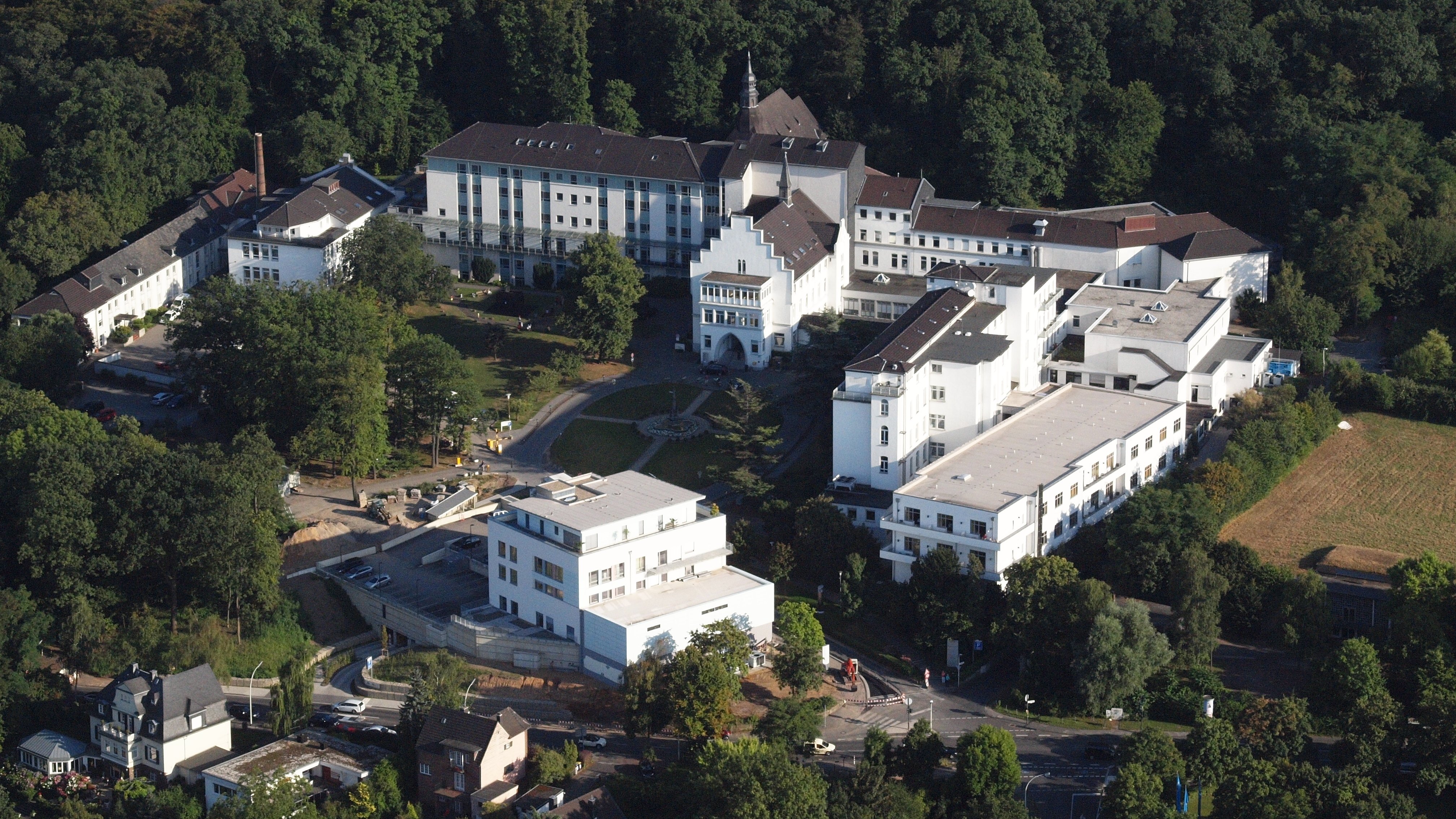 Marienhospital, Bonn-Poppelsdorf: Luftaufnahme